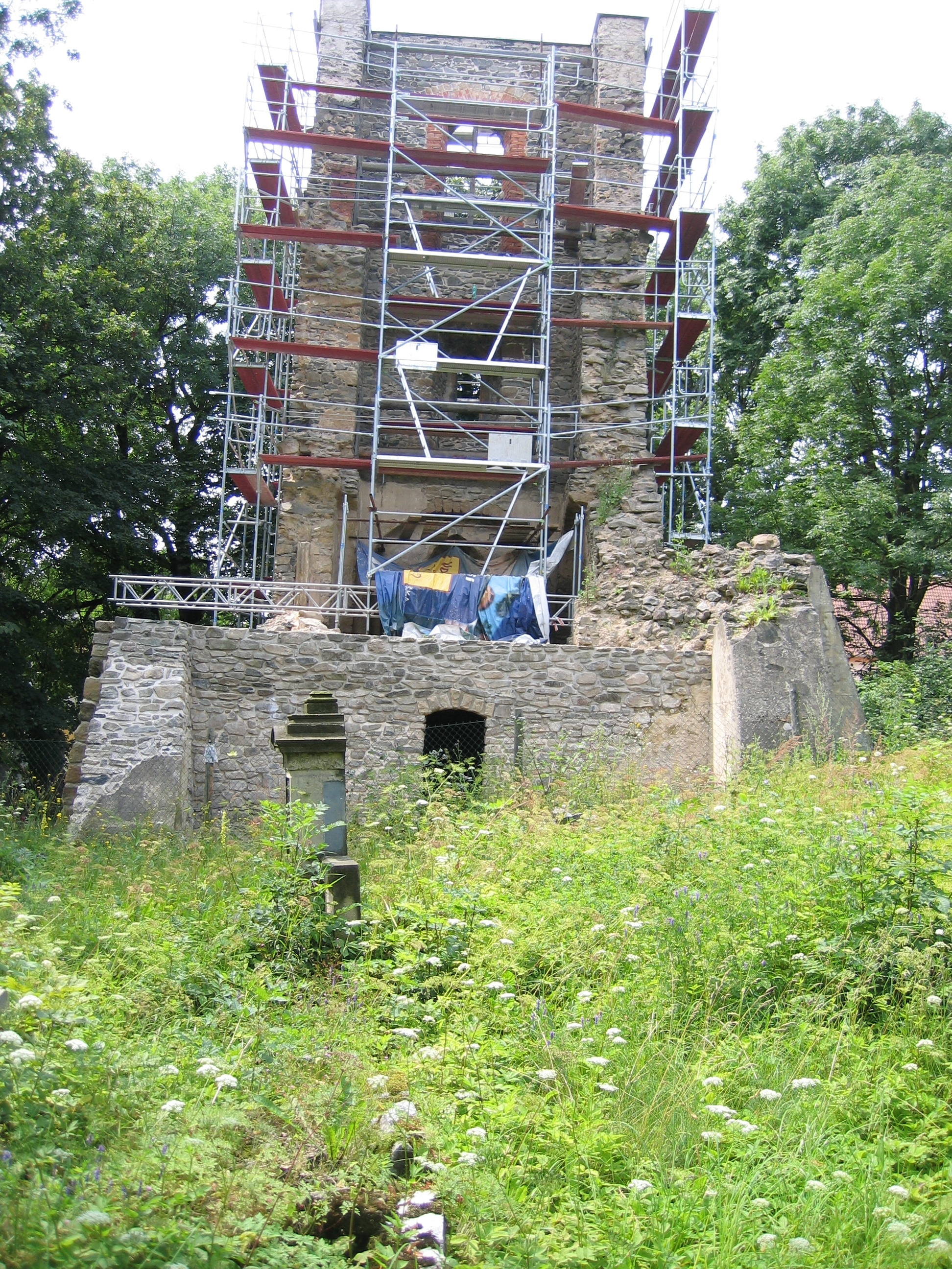 Mukařov, oprava zbytků kostela, stav 31. 7. 2009